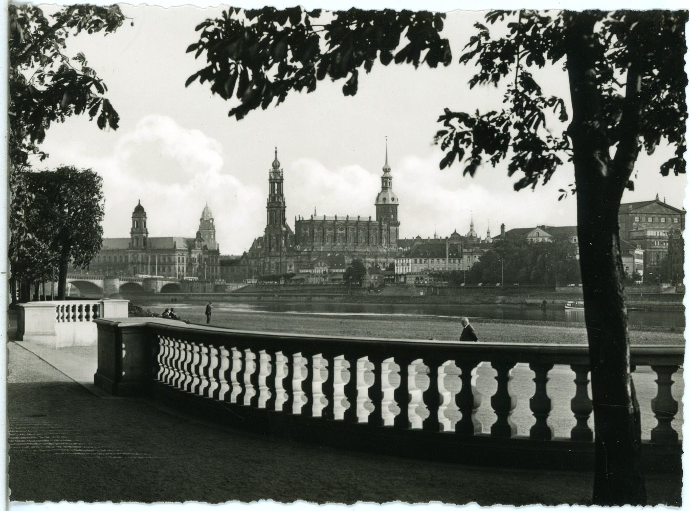 Dresden; Blick vom Dr.-Rudolf-Friedrichs-Ufer This postcard is from publisher Brück & Sohn in Meißen ( postcard has a unique number 29442 and is available in a higher resolution at the publisher. This images was uploaded in a cooperation project between Wikipedians and the publisher.